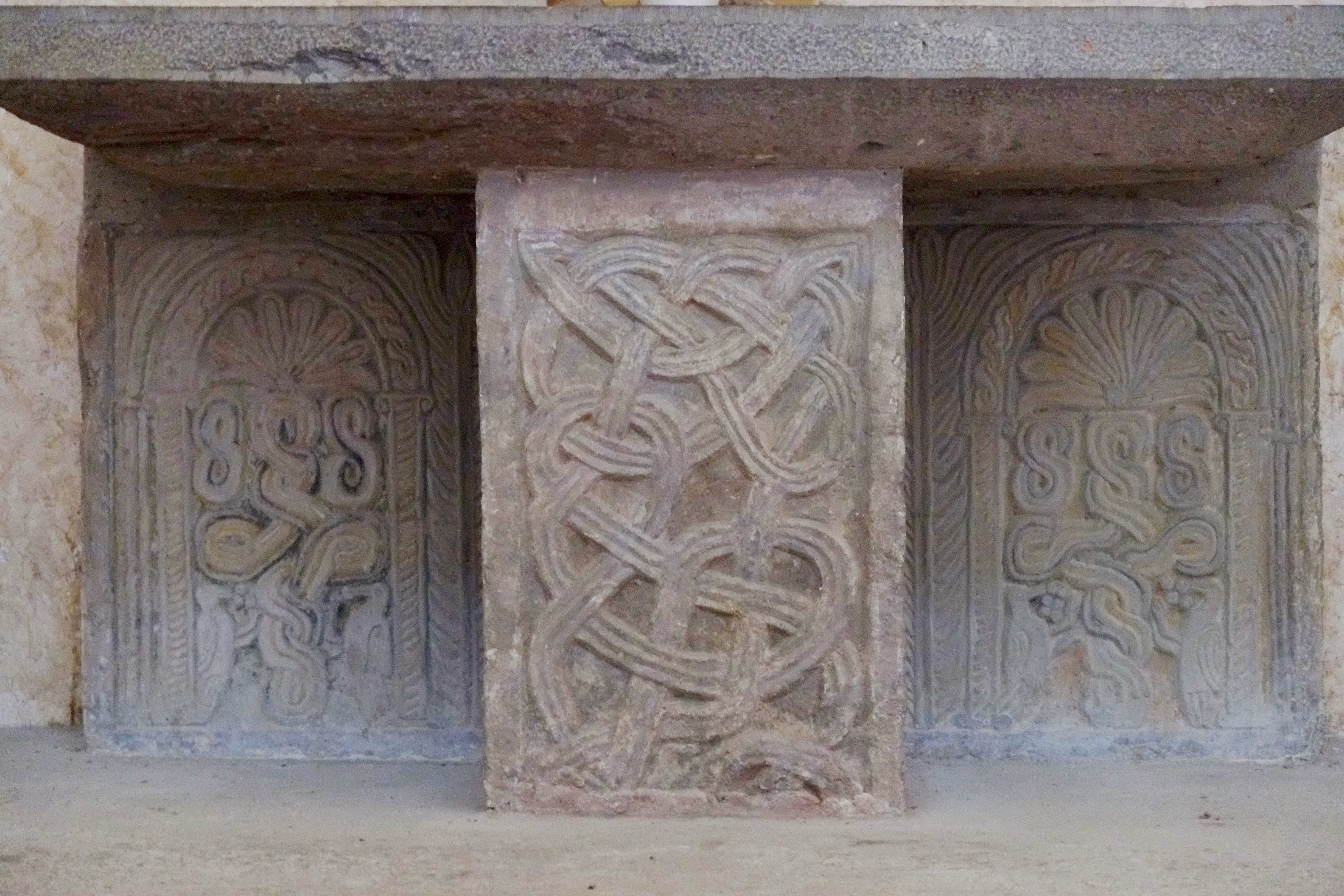 Kirche Saint-Polycarpe in Saint-Polycarpe (Aude) im Département Aude der Region Languedoc-Roussillon (Frankreich)